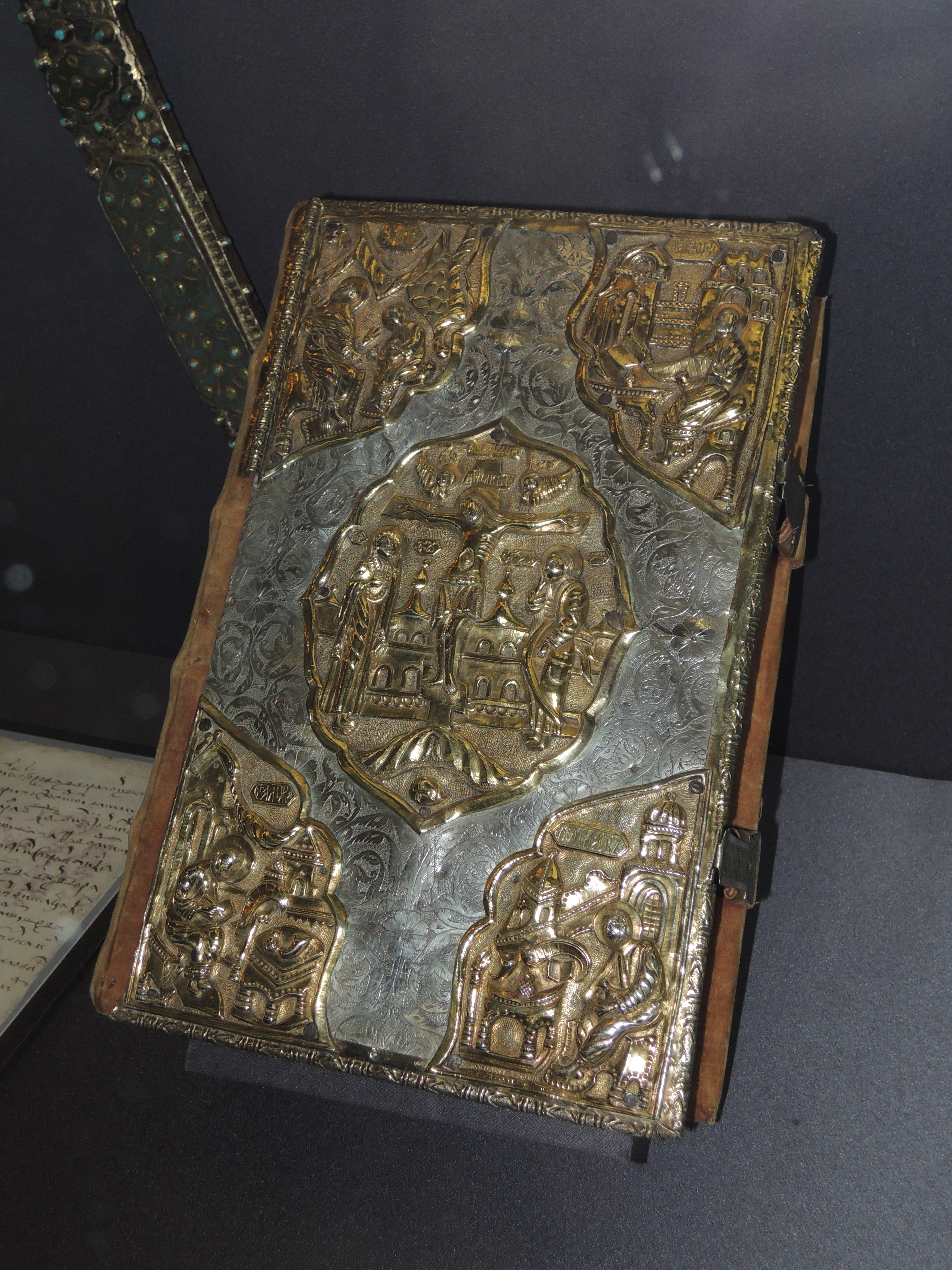 Евангелие Дм. Пожарского. Москва, 1605-6. Оклад - Россия, 1606, 42. Надпись по листам: "Евангелие кнзя Дмитрея Михайловича Пожарского". ГИМ